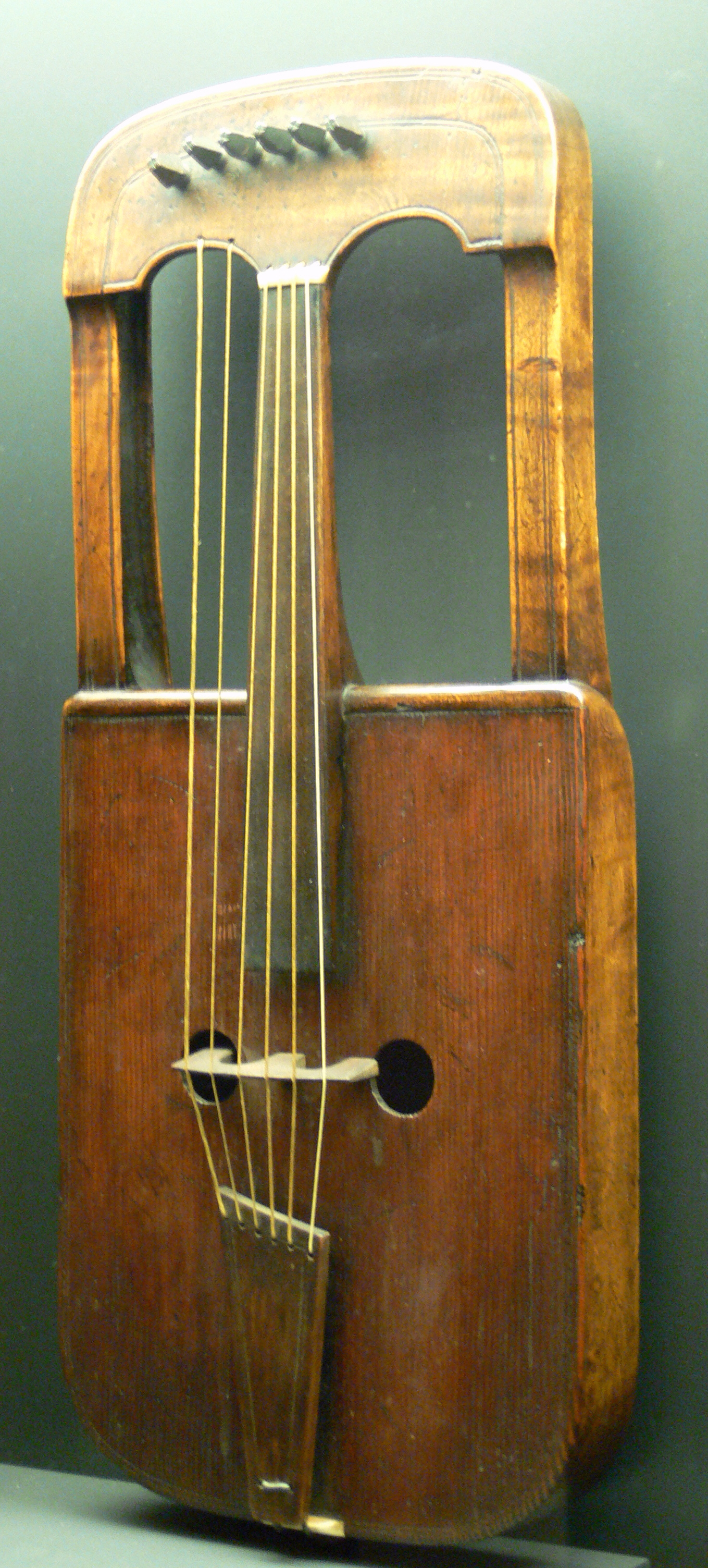 Crwth, Wales, c. 1800–1825 unsigned Gallery: Musikinstrumentenabteilung; Museum Zeughaus; Reiss-Engelhorn-Museen, Mannheim